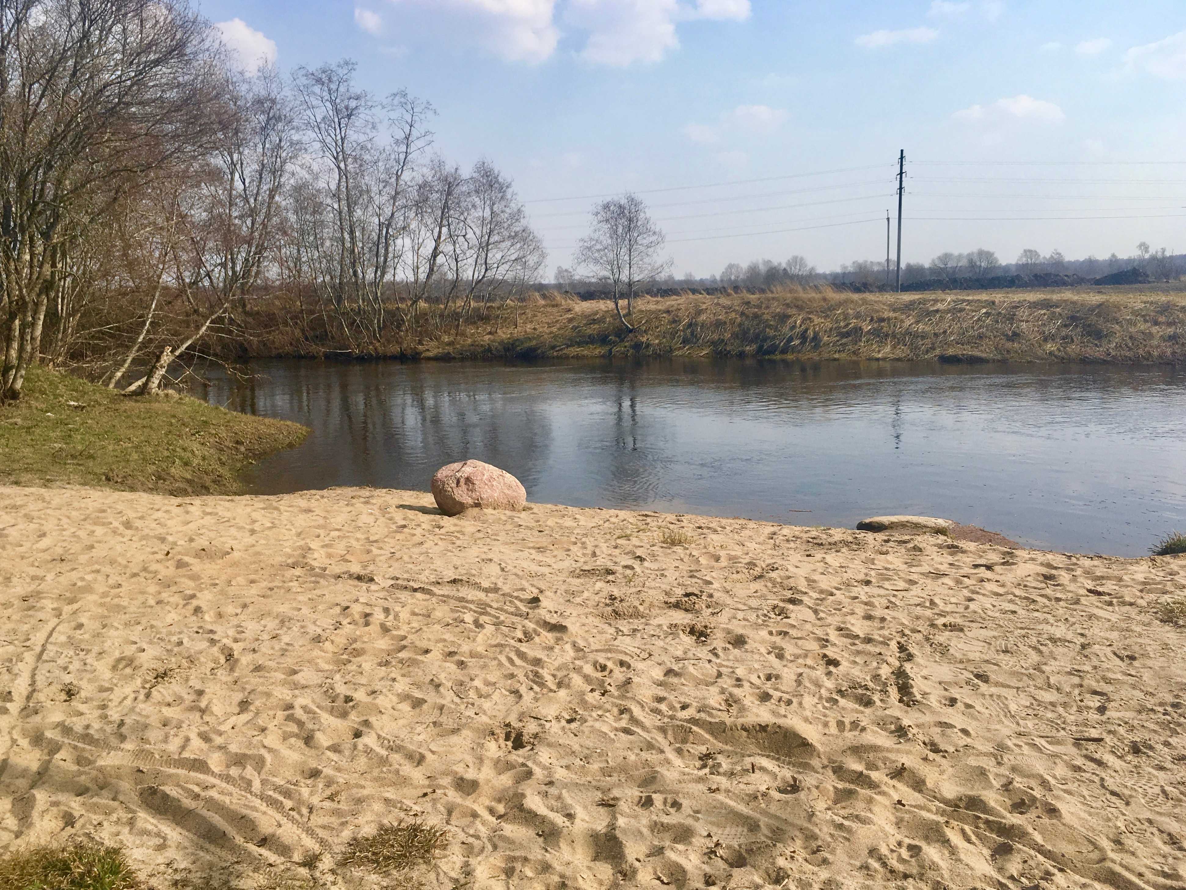 Ujumiskoht Keila Jõepargis.